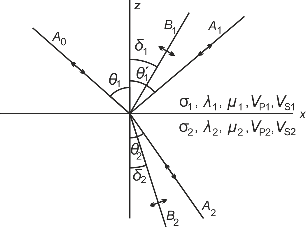 Утворення обмінних хвиль на плоскій границі